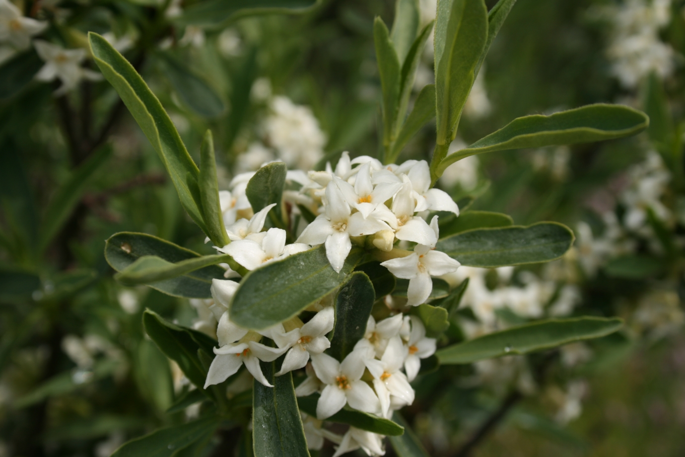 Daphne caucasica: Blomster.